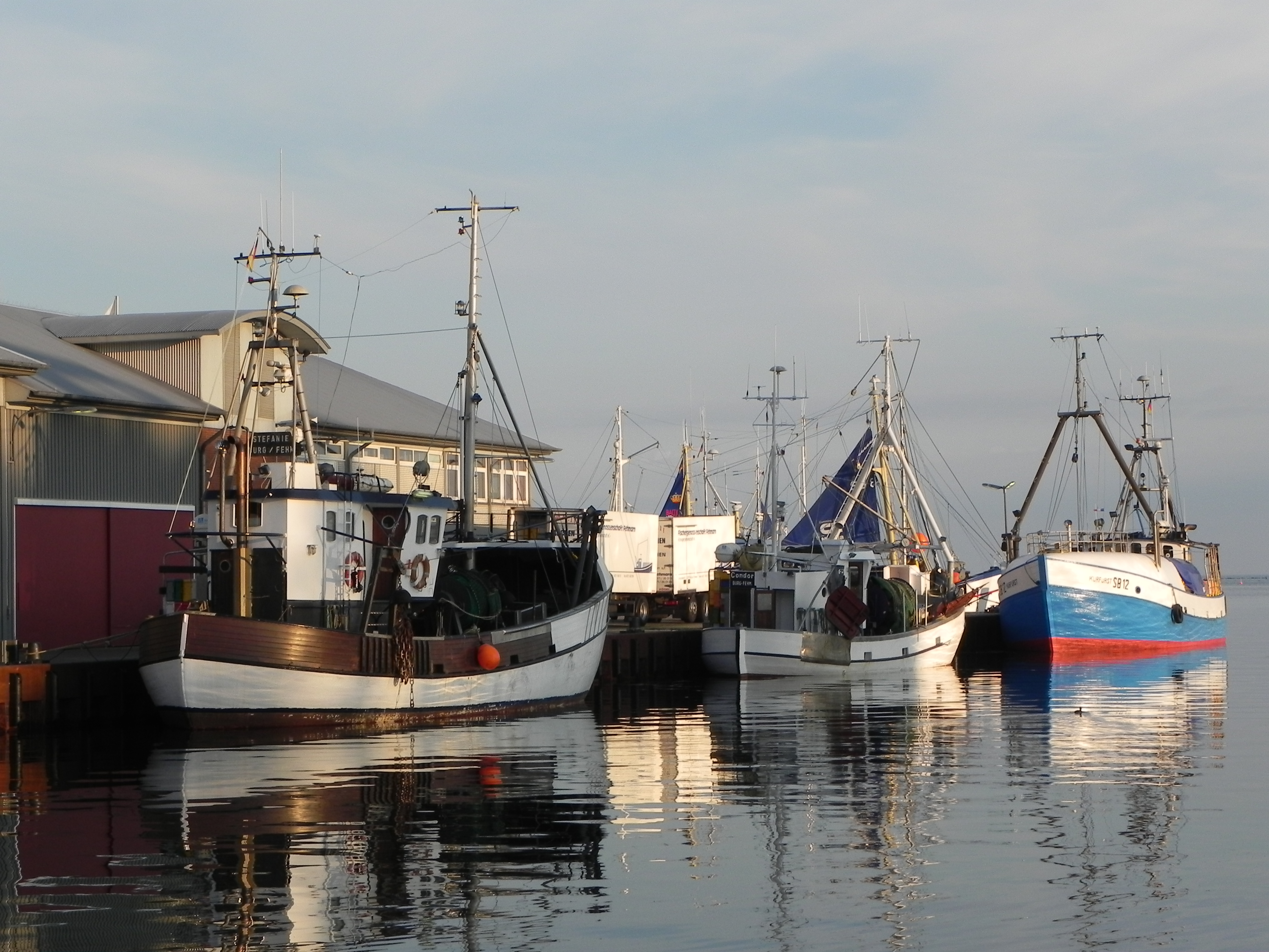 Boote im Hafen Burgstaaken (Fehmarn)